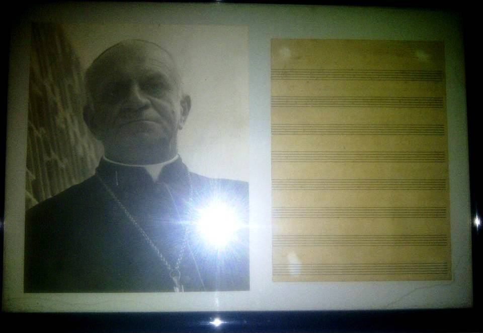 Cuadro en el cual se expone la partitura original del Himno a San Celestino, en la Sacristía de la Catedral de Barcelona